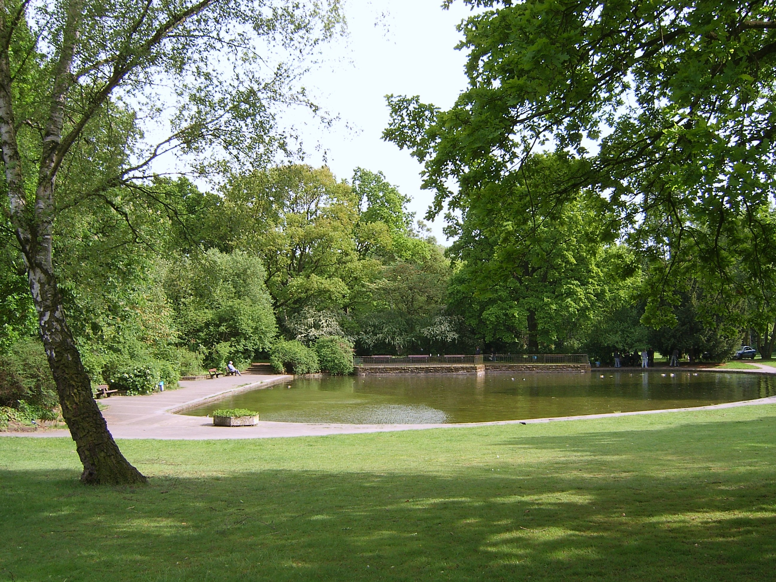 Hamburg, Eilbek, Jacobipark. This is a photograph of an architectural monument. Fotograf: selbst Datum: 24.5.2006